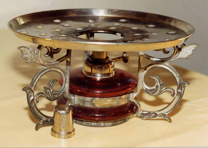 Réchaud de Table Henri Gautreau H.G